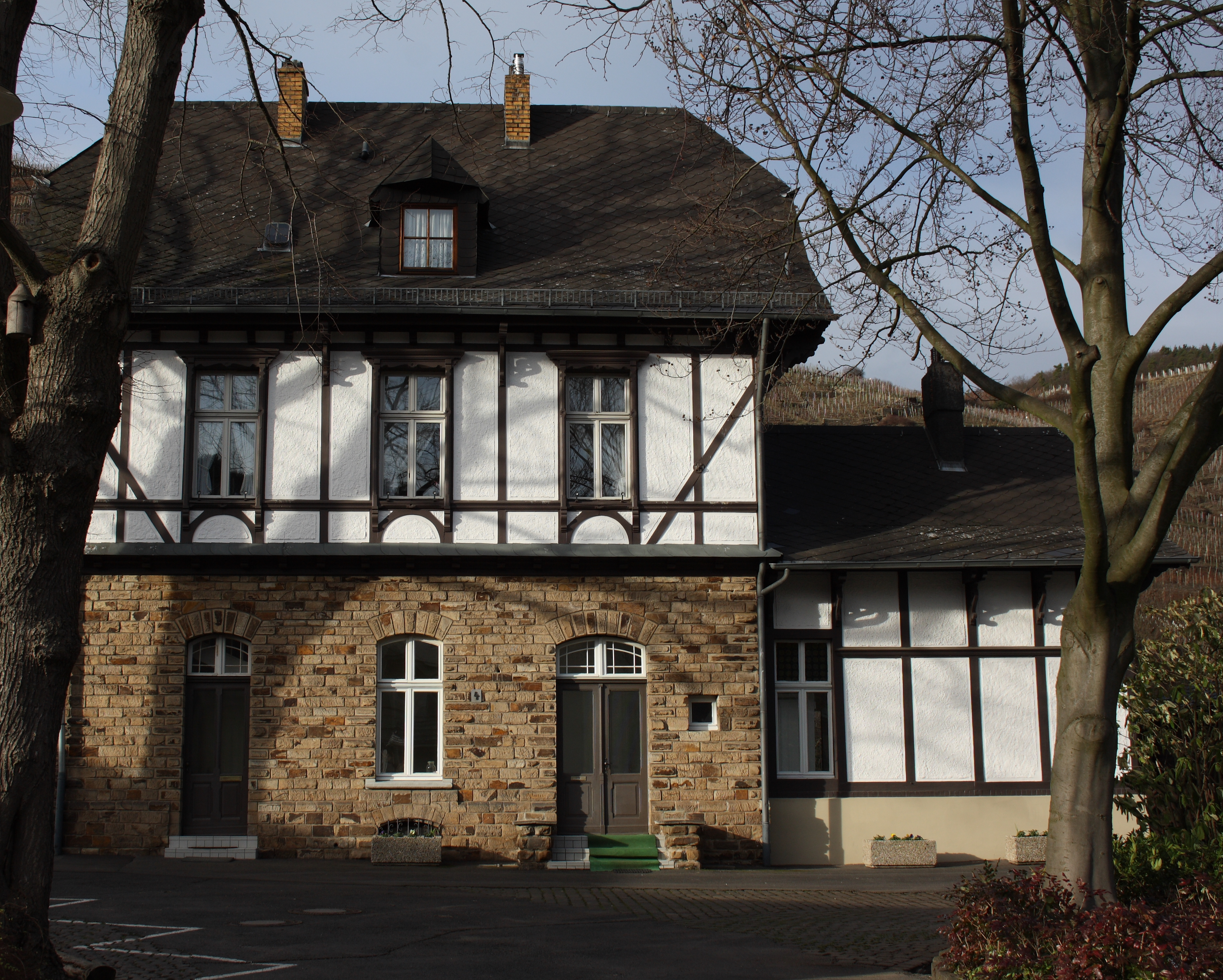 ehemaliger Bahnhof von Walporzheim, Neue Domherrenstraße 4, erbaut 1866